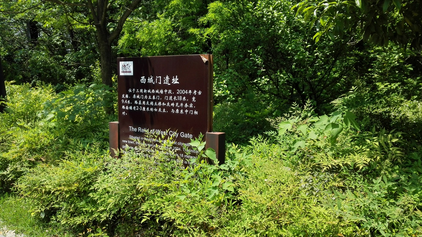 中文（中国大陆）: 合肥三国新城遗址-西城门遗址